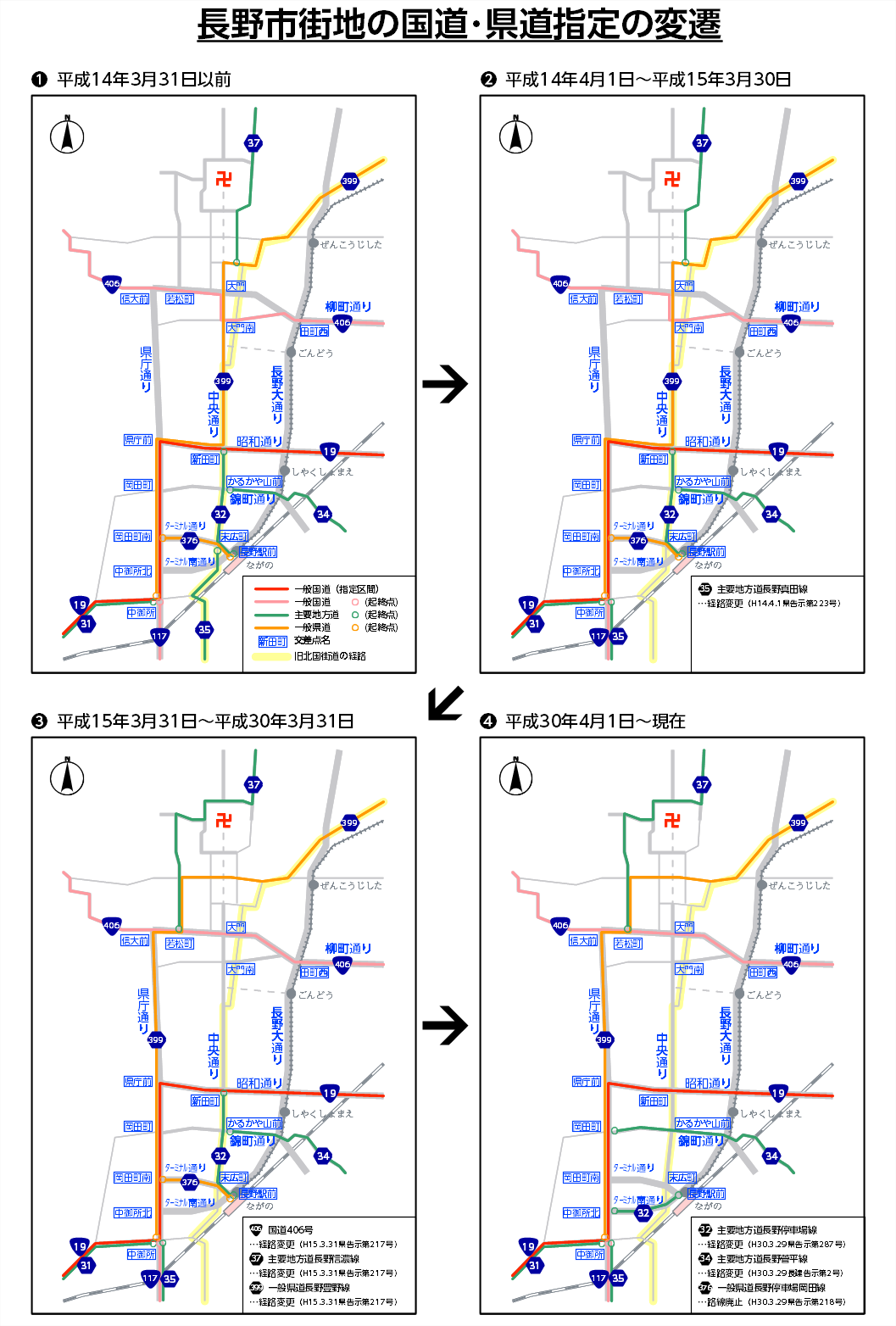 長野市街地における国道・県道指定の変遷